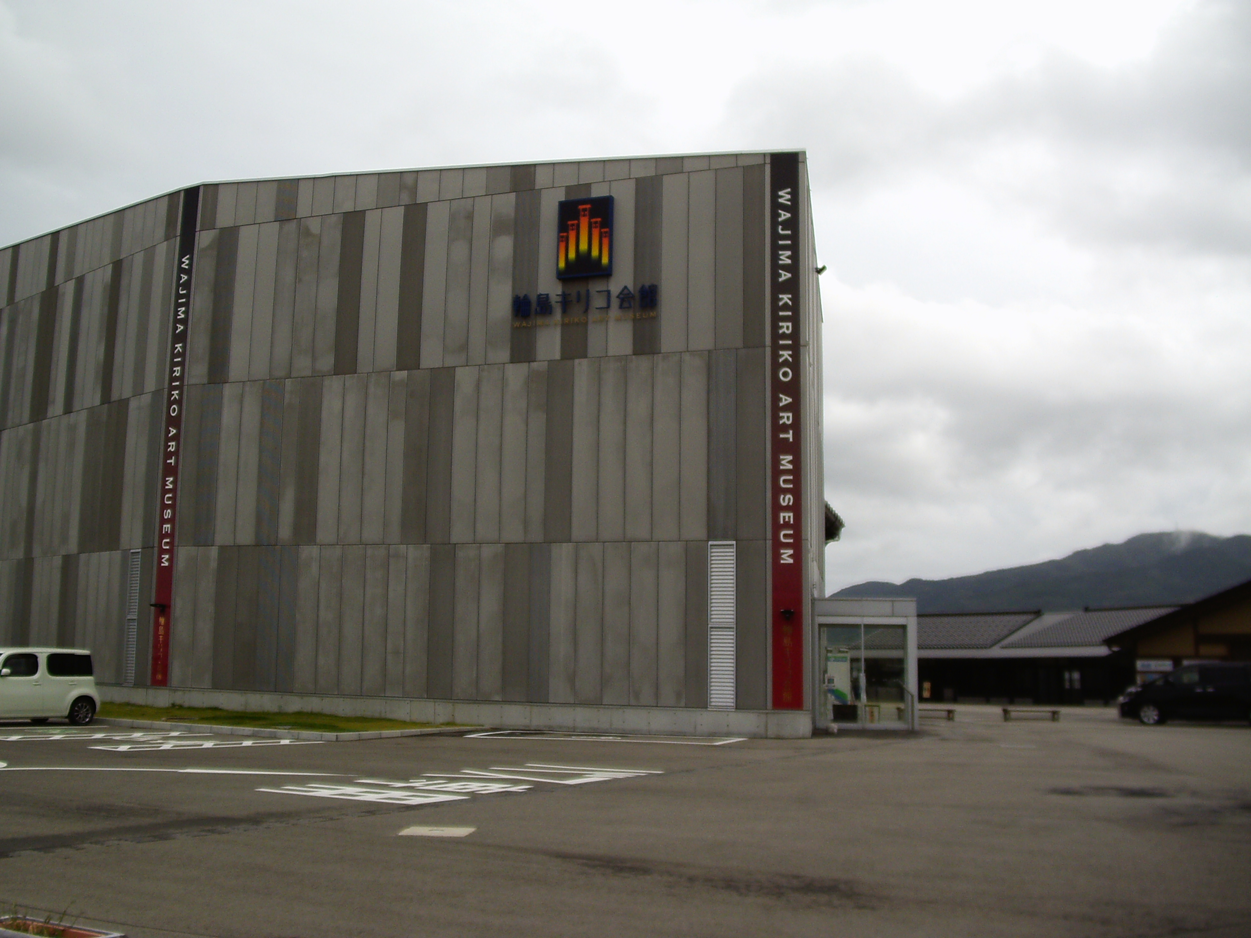 輪島の祭りキリコを紹介している